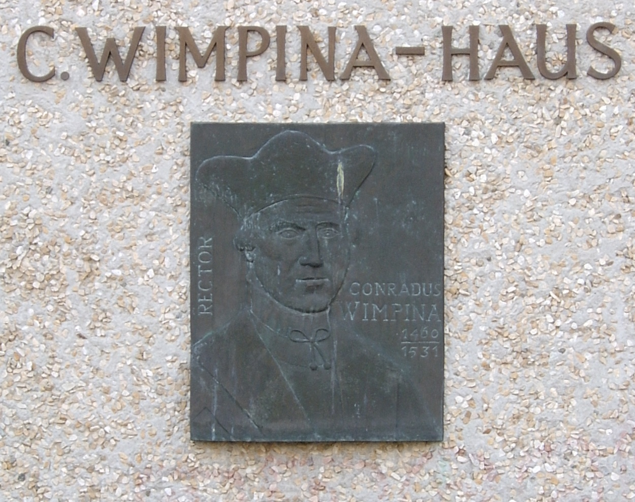 Schild am Wohnhaus in Frankfurt (Oder) im Studentendorf Mühlenweg. Dargestellt ist der Rektor Conradus Wimpina (1460-1531)